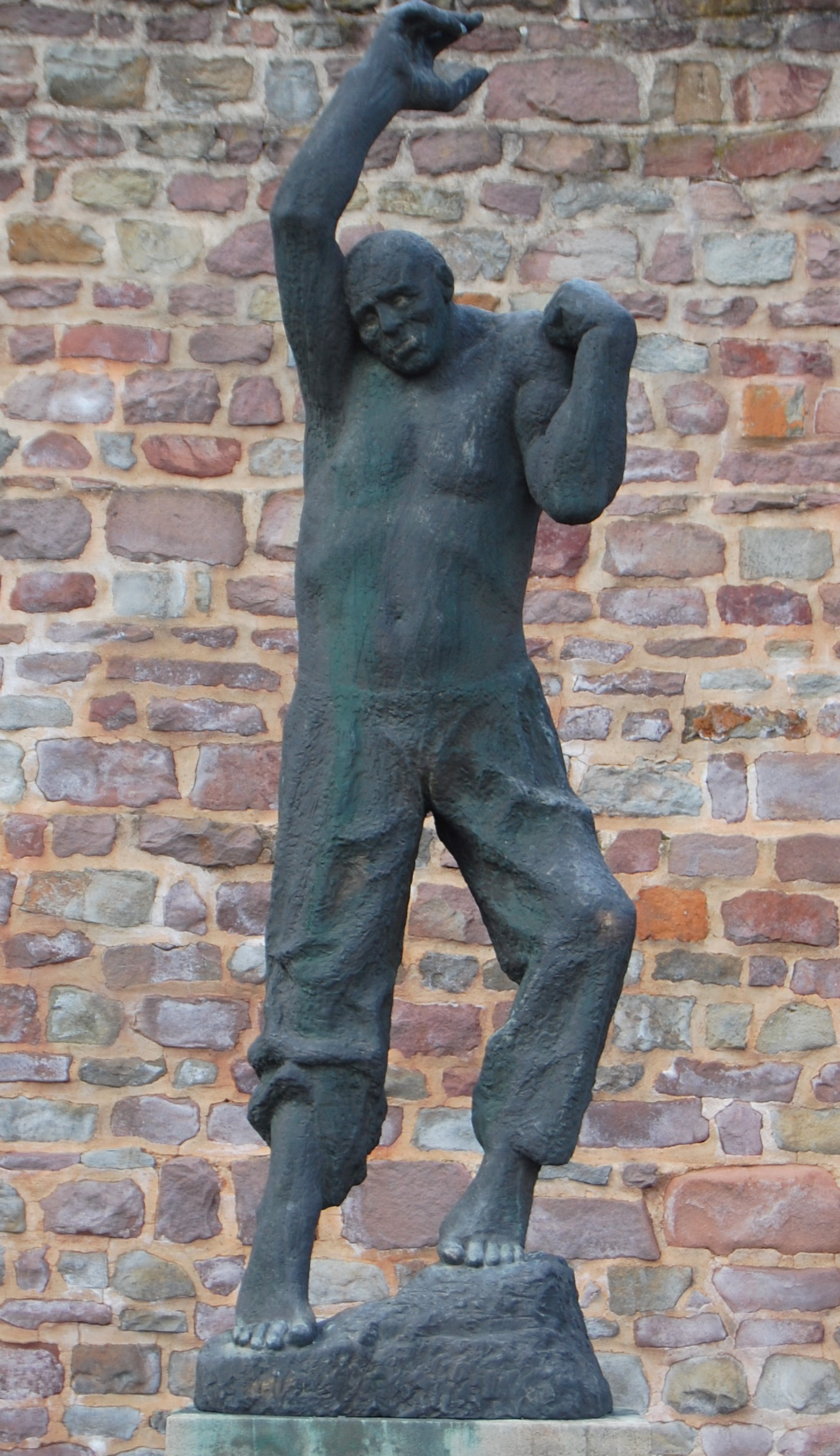 Plastik Aufsteigender von Fritz Cremer in Magdeburg